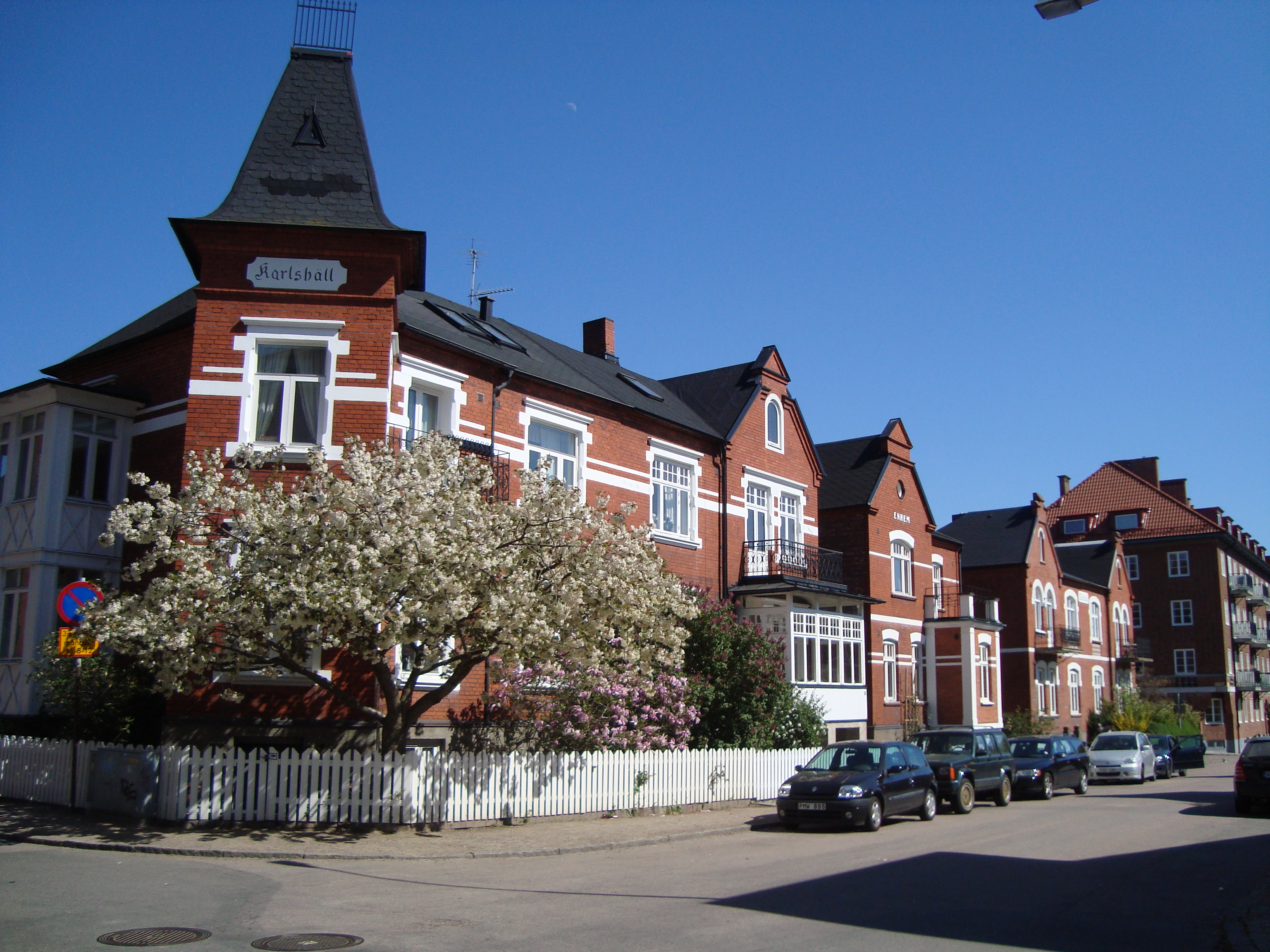 Egnahemsbostäder på Tågaborg i Helsingborg.